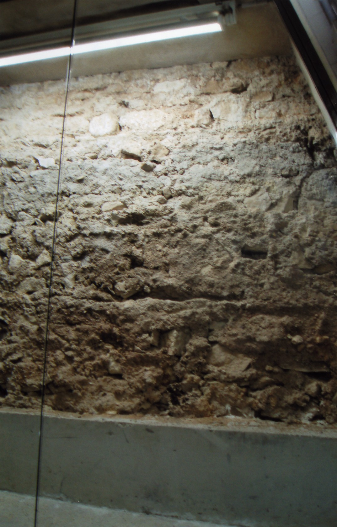 Mur d'enceinte du forum de Lutèce (bd Saint-Michel)